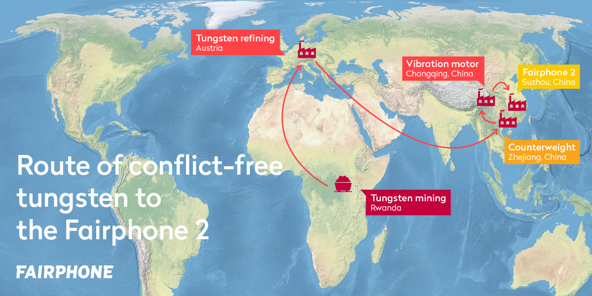 Aanpassing2